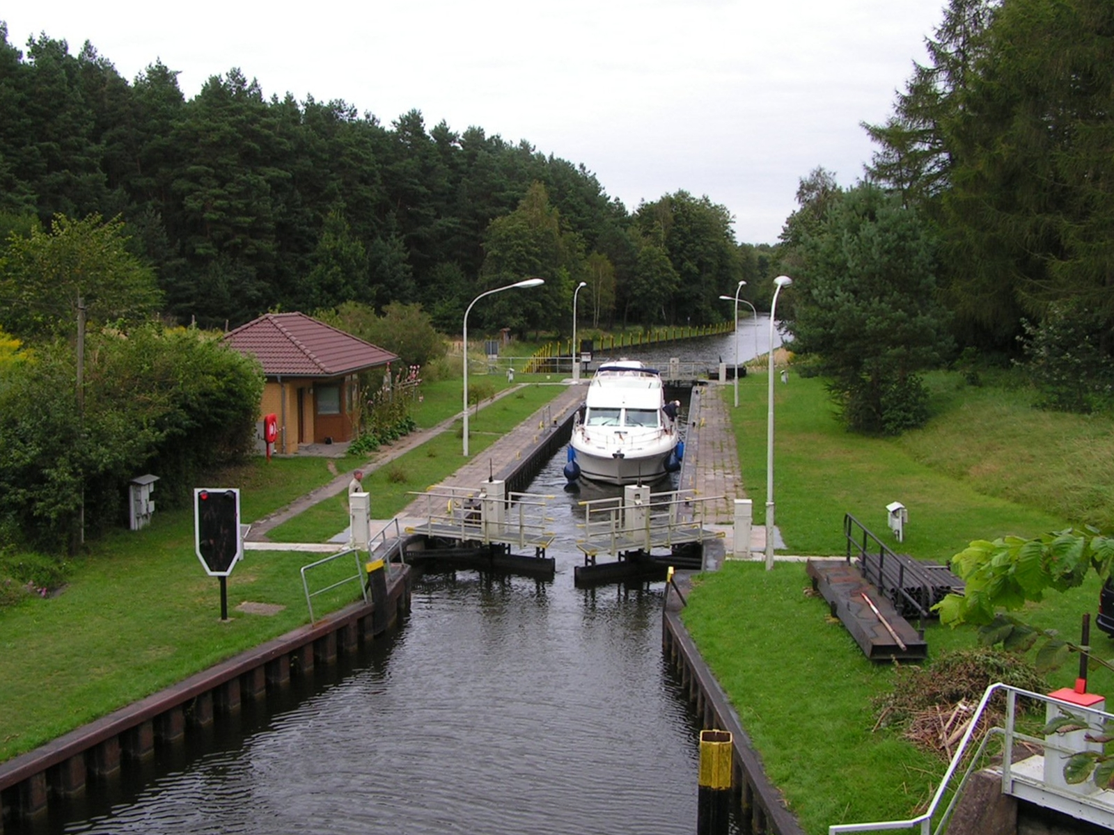 Diemitzer Schleuse